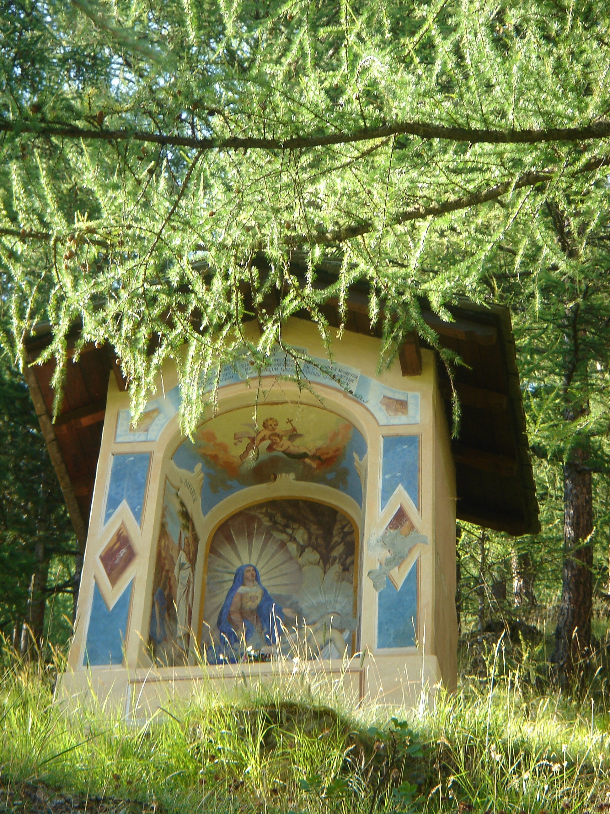 Cappellina delll'Addolorata